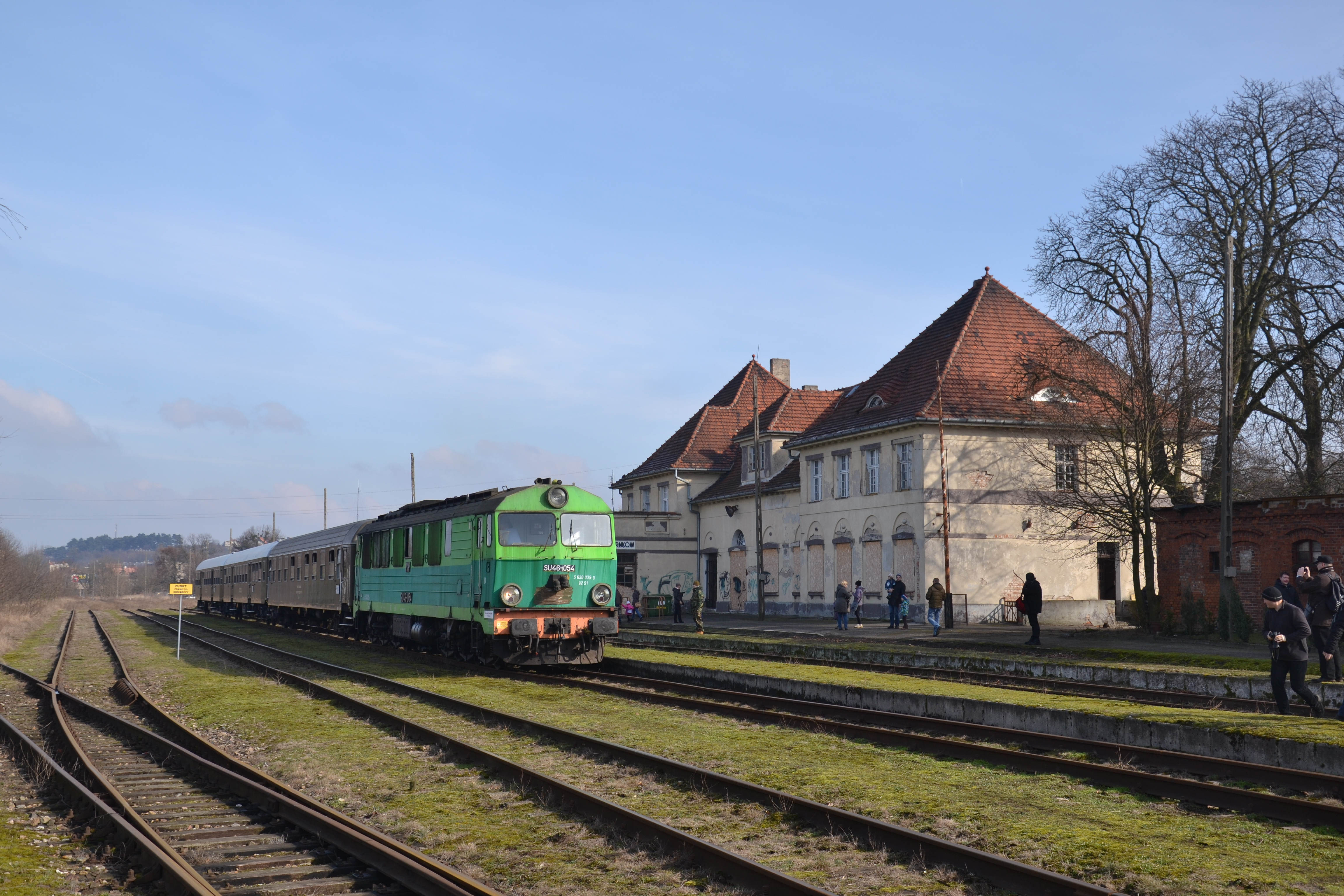 SU46-054 z pociągiem turystycznym "Noteć"(turkol.pl) relacji Poznań Główny-Czarnków na stacji w Czarnkowie